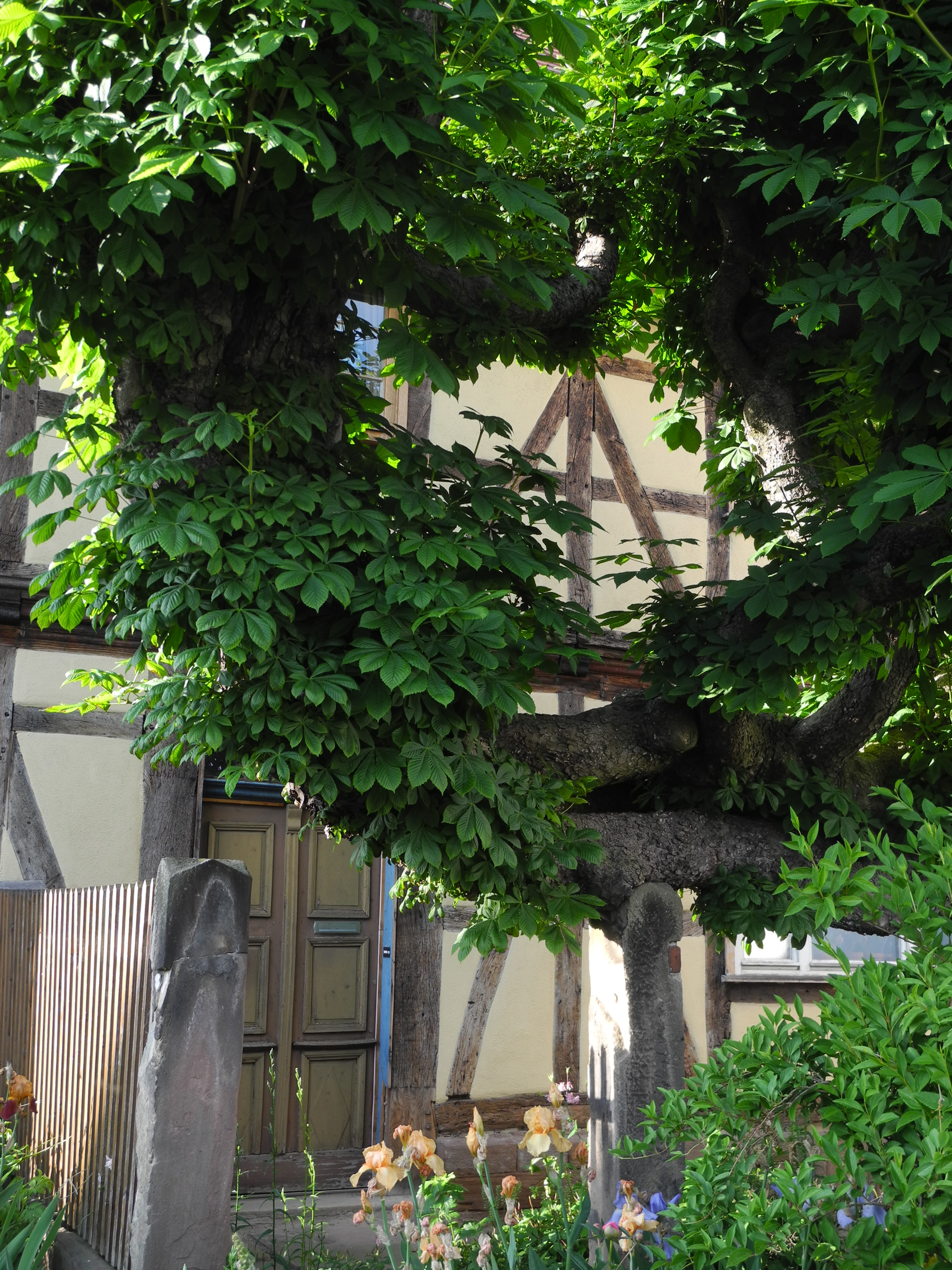 Naturdenkmal in Kassel 611.092. "1 Rosskastanie" (Aesculus hippocastanum) - Kronenstraße, im Vorgaten von Haus Nr. 5, Ecke Obervellmarer Straße.